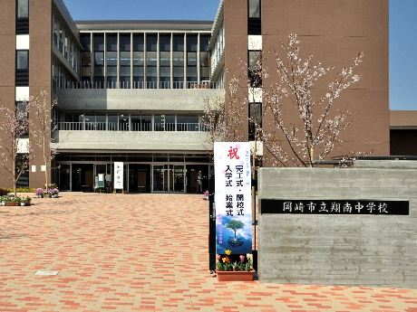 2013年4月5日、完工式・開校式を迎えた同校正門